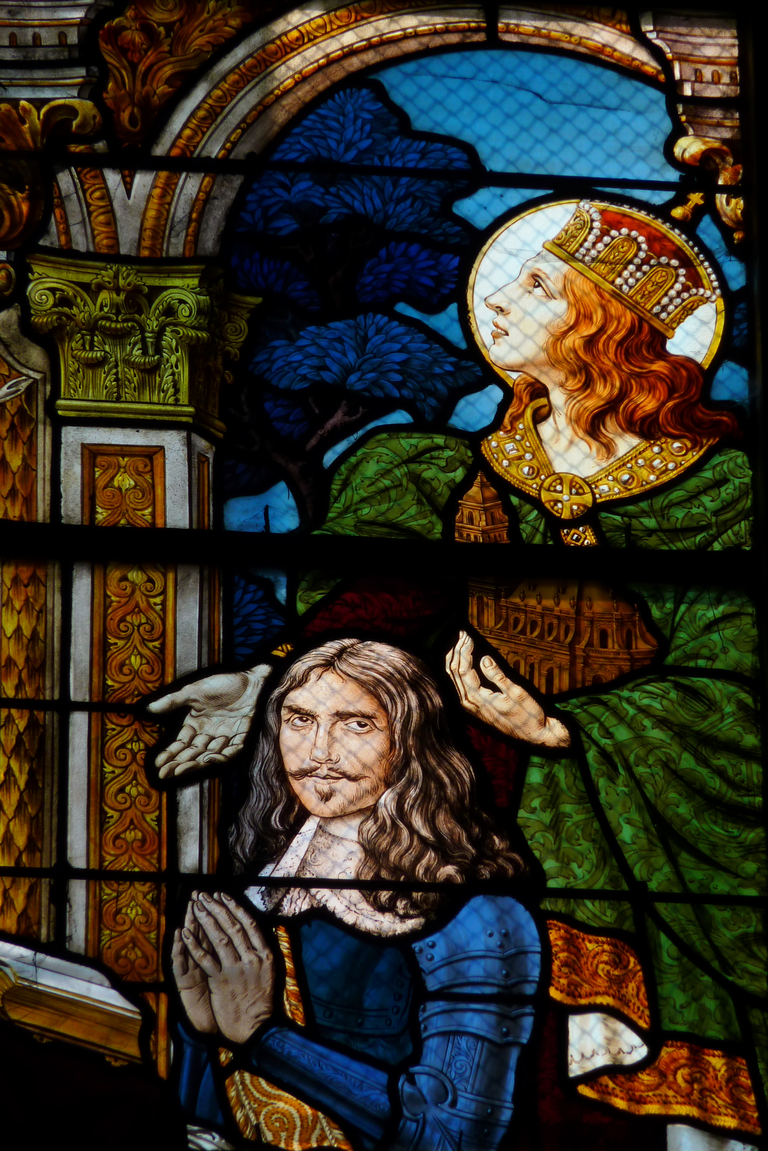 Bleiglasfenster (Ausschnitt) in der katholischen Pfarrkirche Saint-Martin (Collégiale Saint-Martin) in Montmorency, Darstellung: Heinrich II. und Henri de La Tour d’Auvergne, Fenster aus dem 19. Jahrhundert